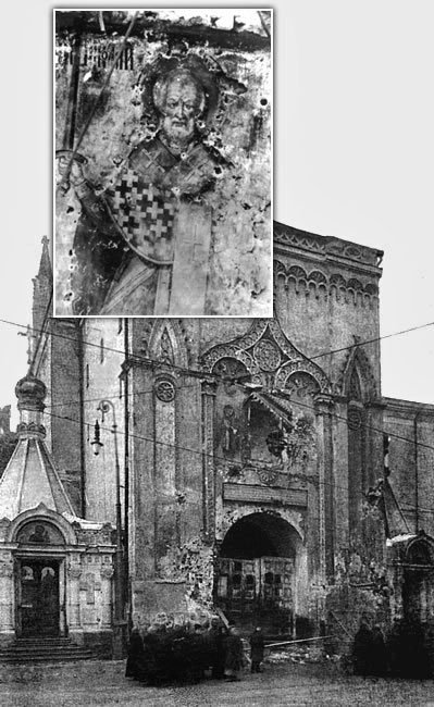 коллаж изображений 1917 года Никольской башни